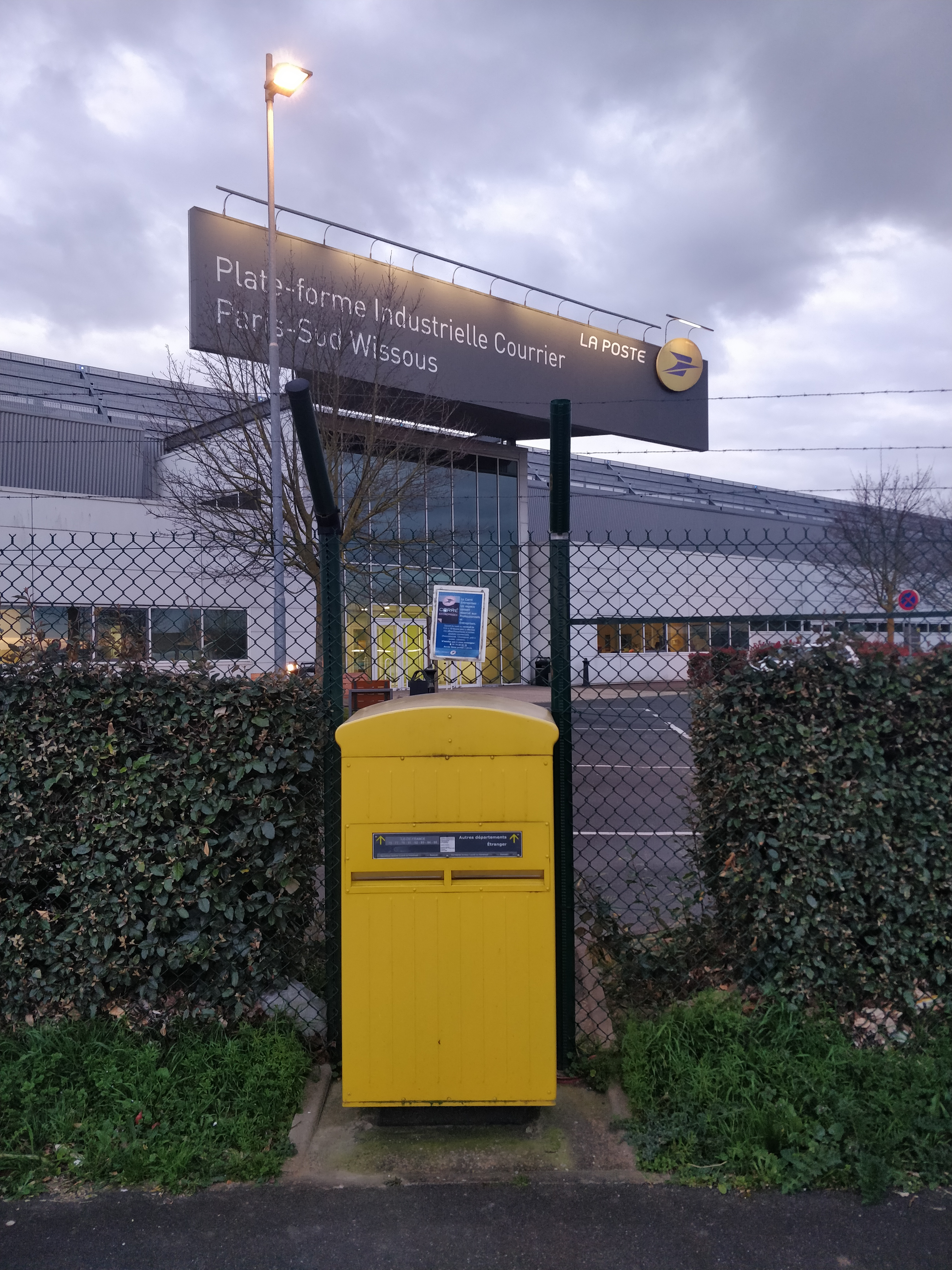 Boîte postale de la Plate-forme Industrielle Courrier Paris-Sud Wissous.